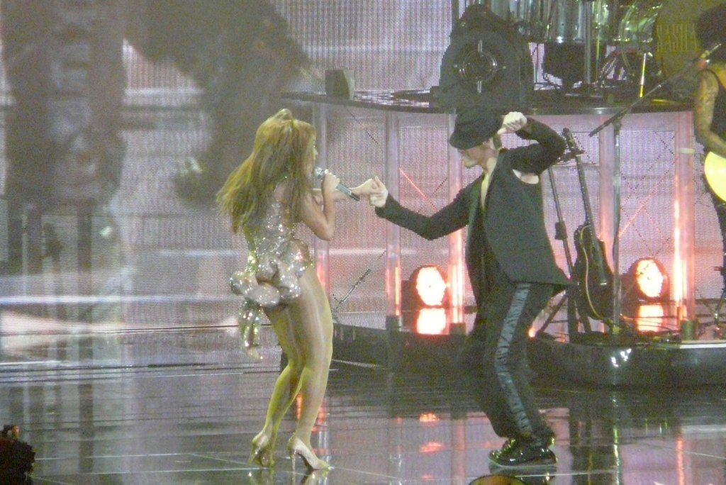 Get Me Bodied